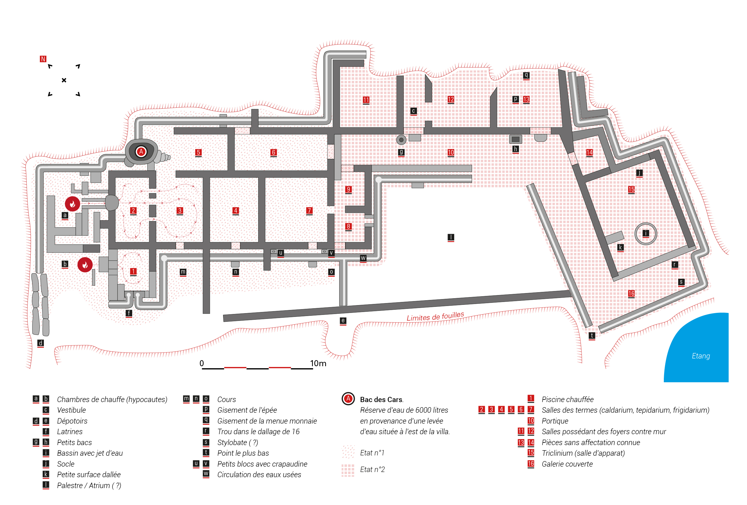 Plan de la villa d'après les relevés de Marius Vazeilles et les travaux de guy Lintz. Schéma original page 21 du livret "Station gallo-romaine des Cars" de Marius Vazeilles. Editeur inconnu.